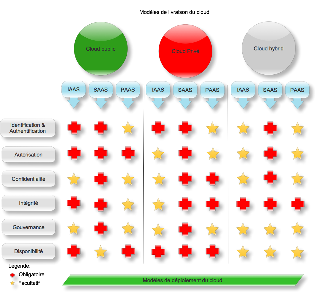 Cloud security models